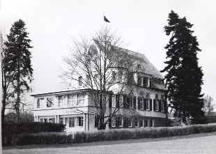 Verbindungshaus der Studentenverbindung Landsmannschaft Württembergia zu Hohenheim